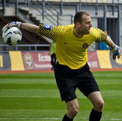 Лібор Грдлічка - словацький футболіст, воротар